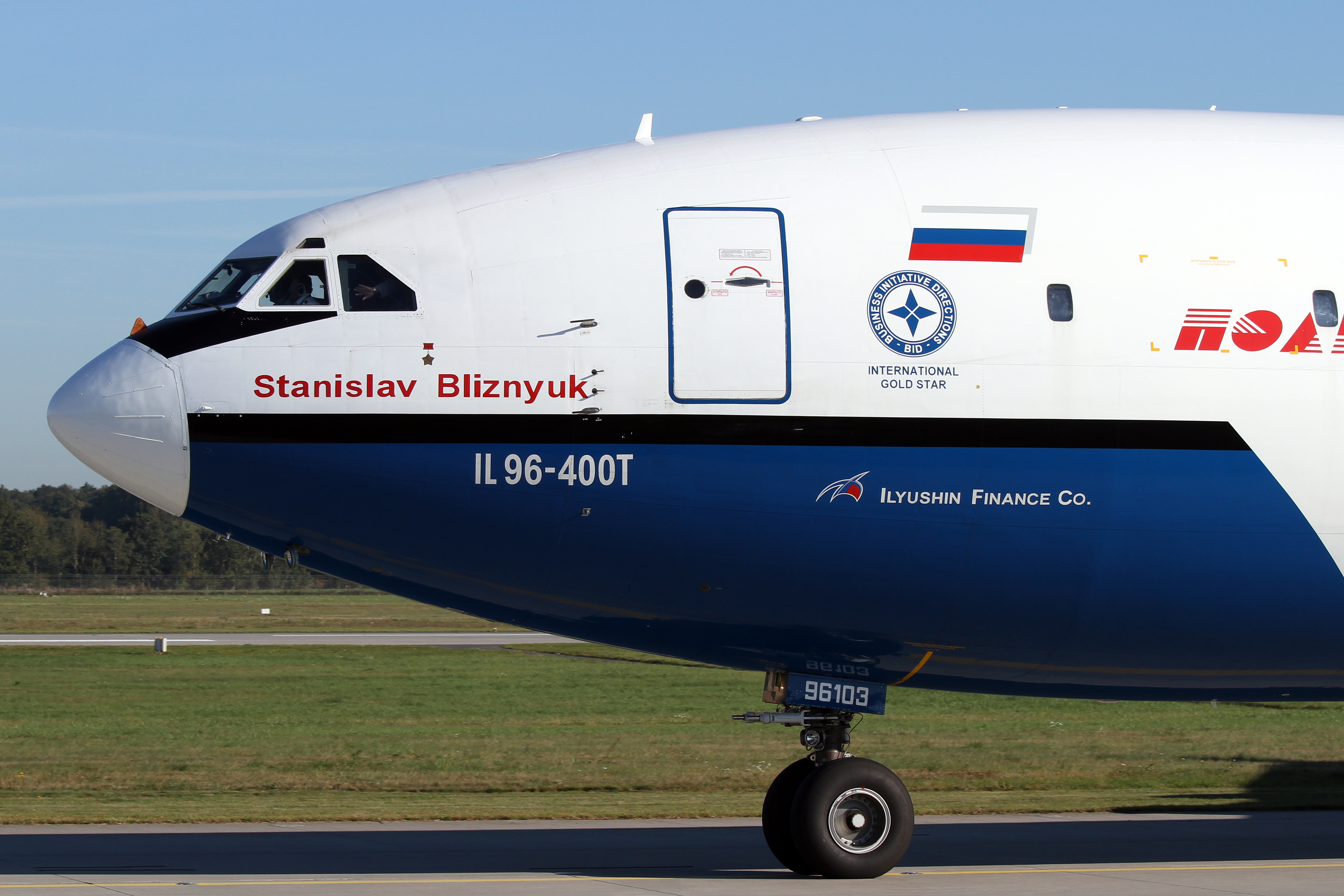 IMG_4097X